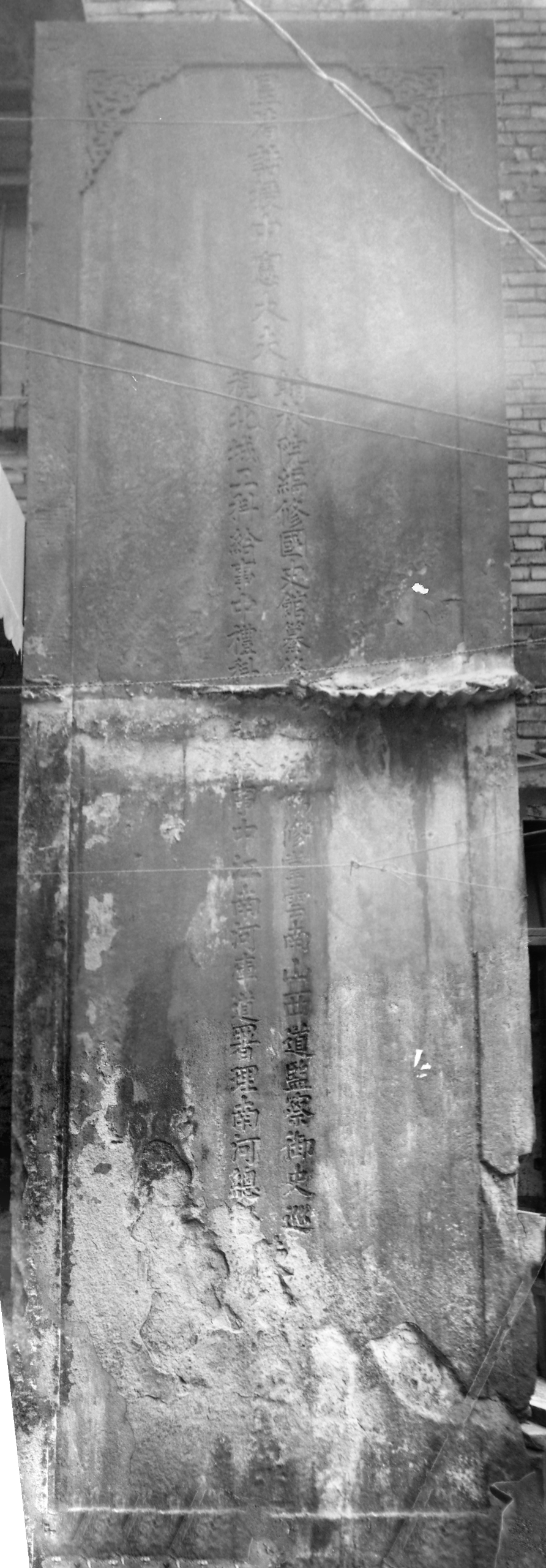 中文（台灣）: 皇清誥授中憲大夫翰林院編修國史館纂修起居注協修掌雲南山西道監察禦史巡視北城工科給事中禮科掌印給事中江南河庫道署理南河總督陳公爔之神道